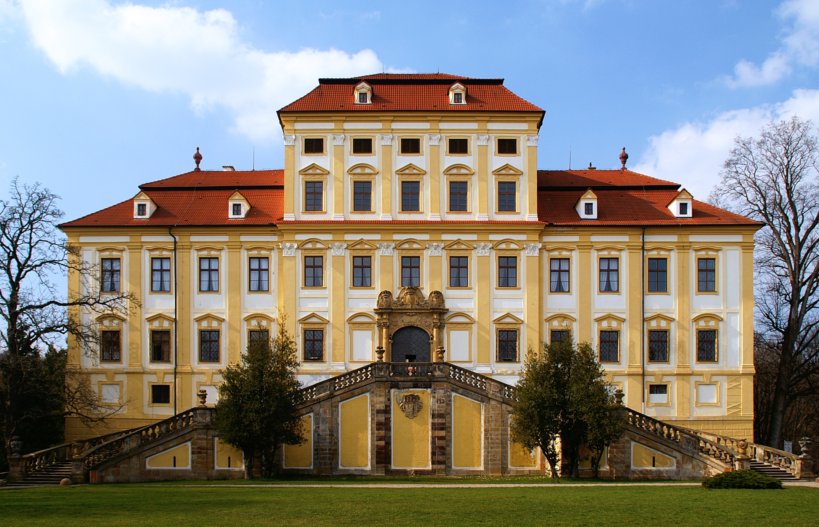 Zámek v Červeném Hrádku, místní části Jirkova.